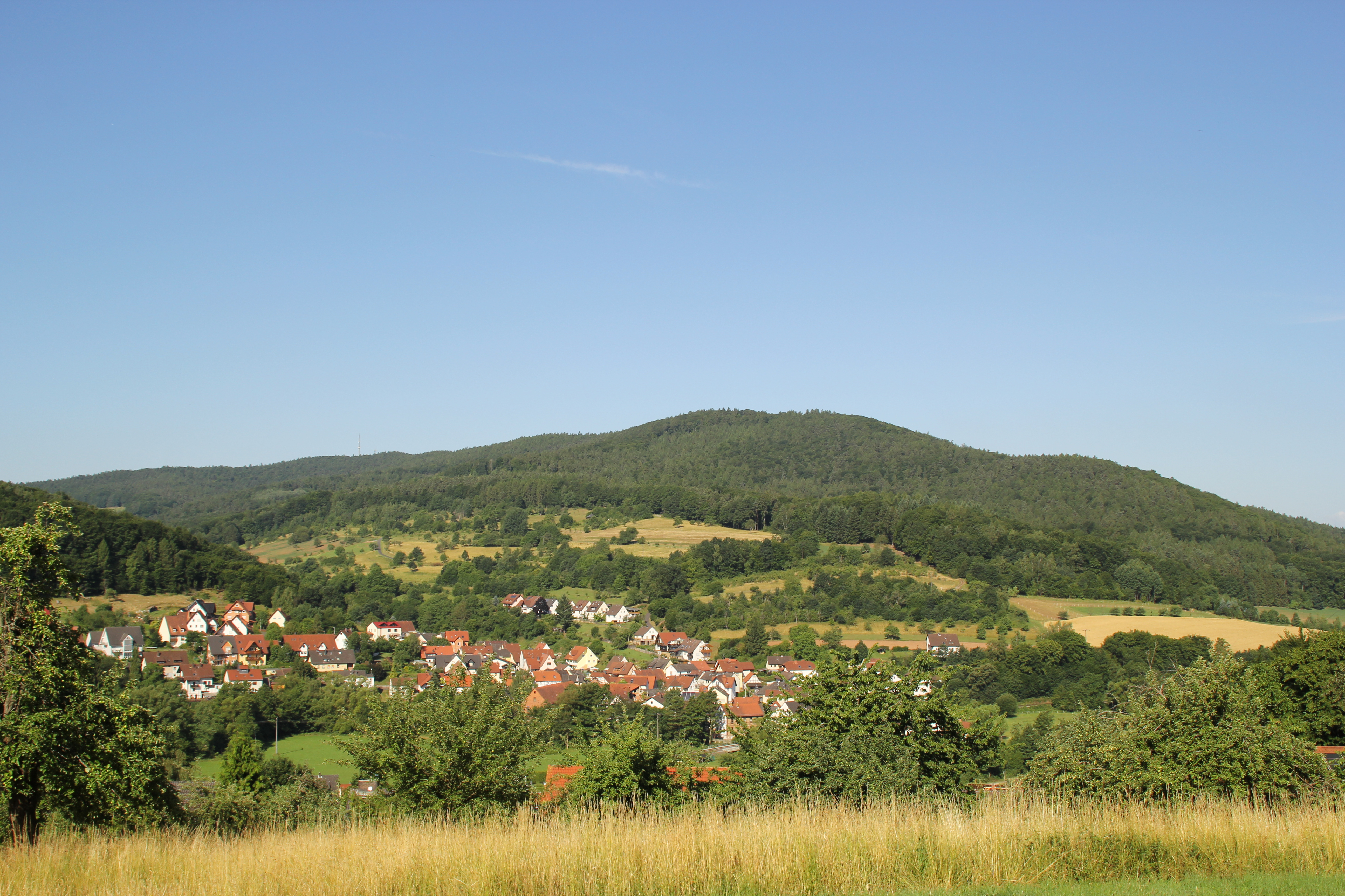 Die Hohe Mark am Hahnenkammhöhenzug, mit Giftigem Berg rechts.